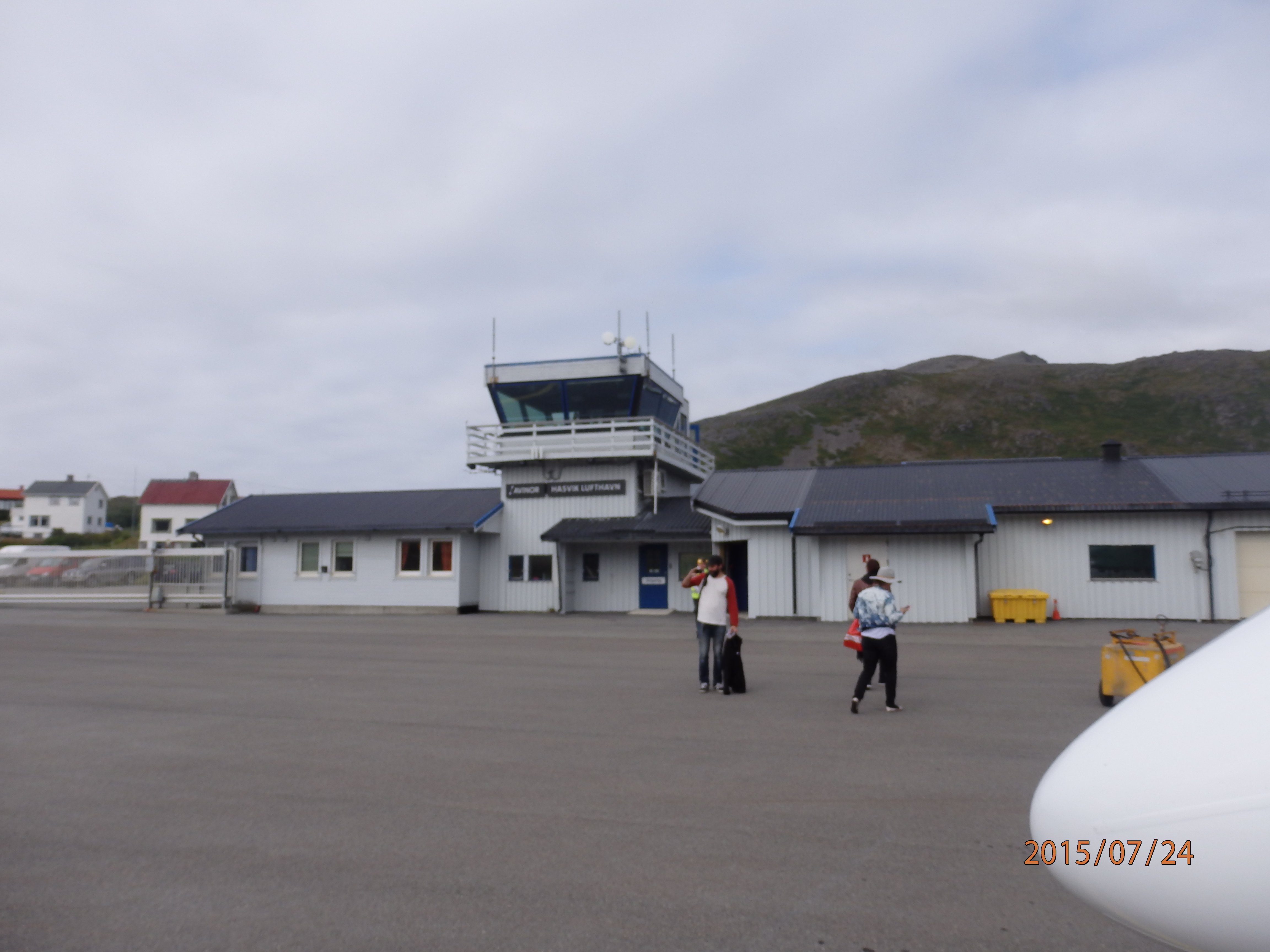 Hasvik lufthavn